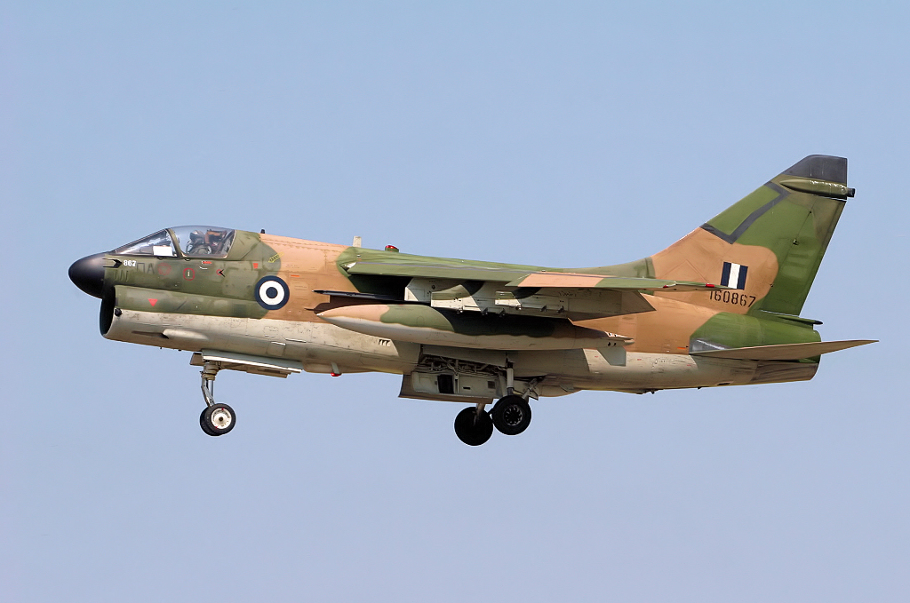 Corsair - RIAT 2006